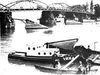 Поћореков мост